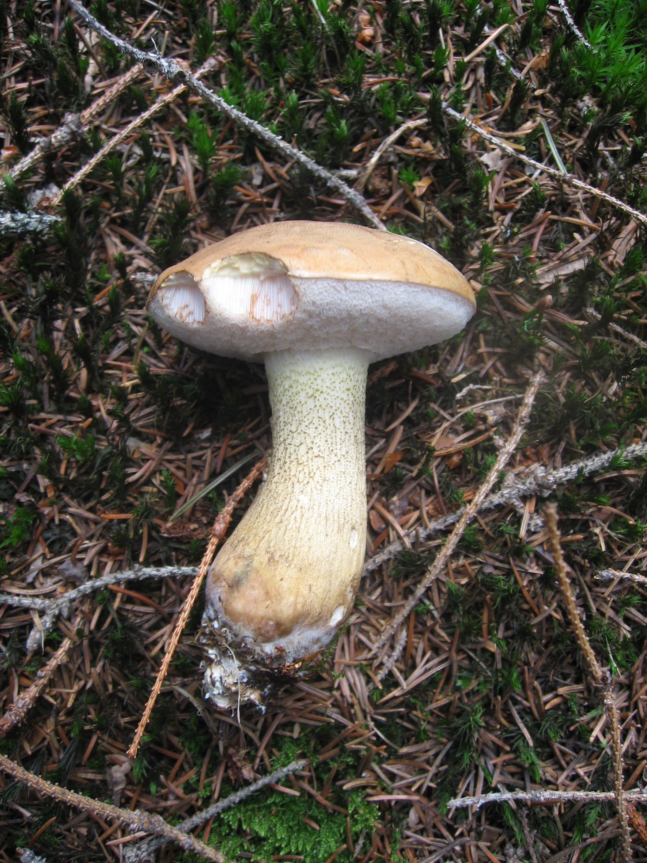 Tyllopilus feleus